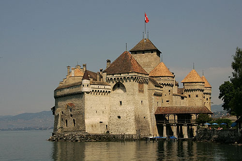 Château de Chillon à Montreux